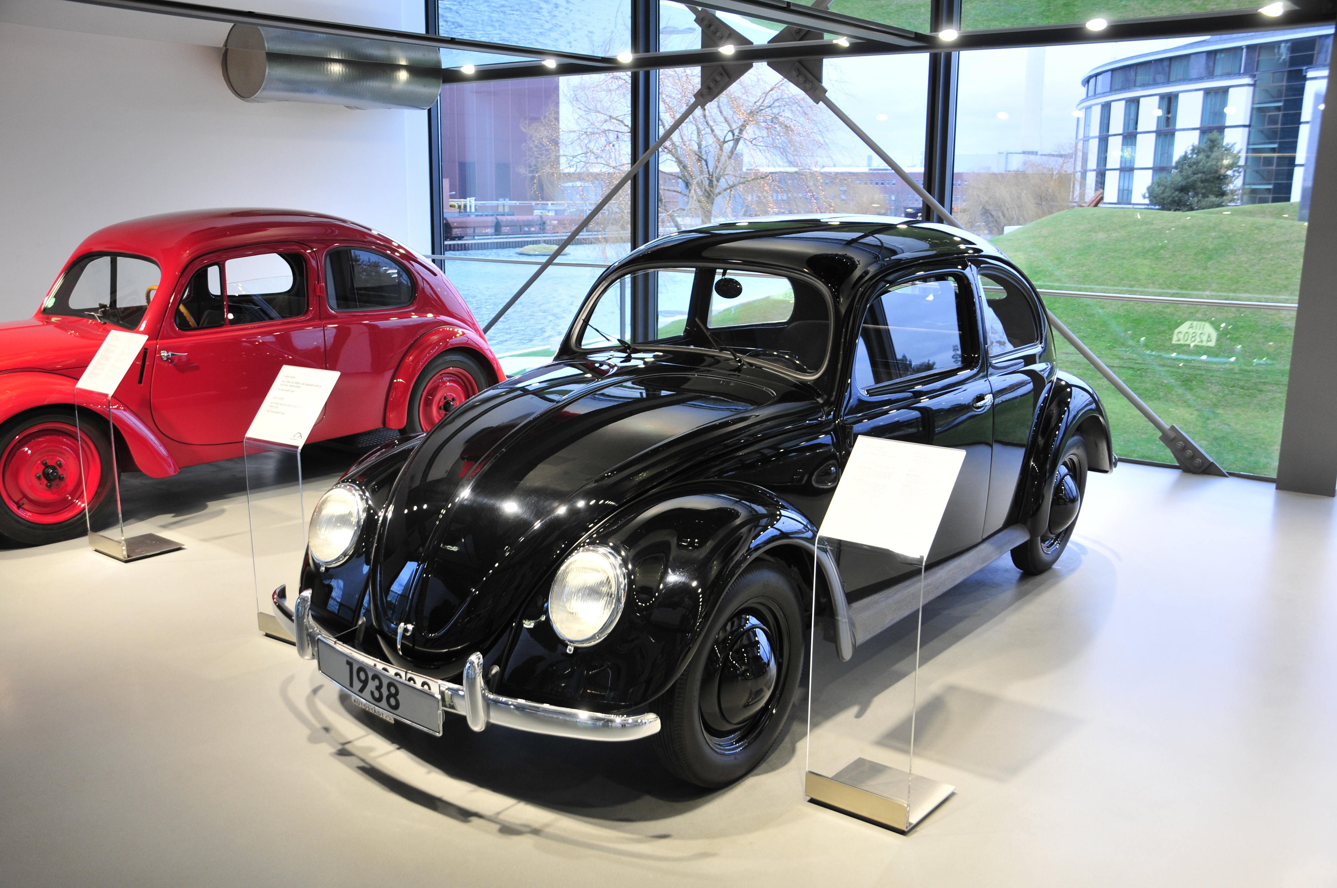 Fahrzeug in der Autostadt Wolfsburg